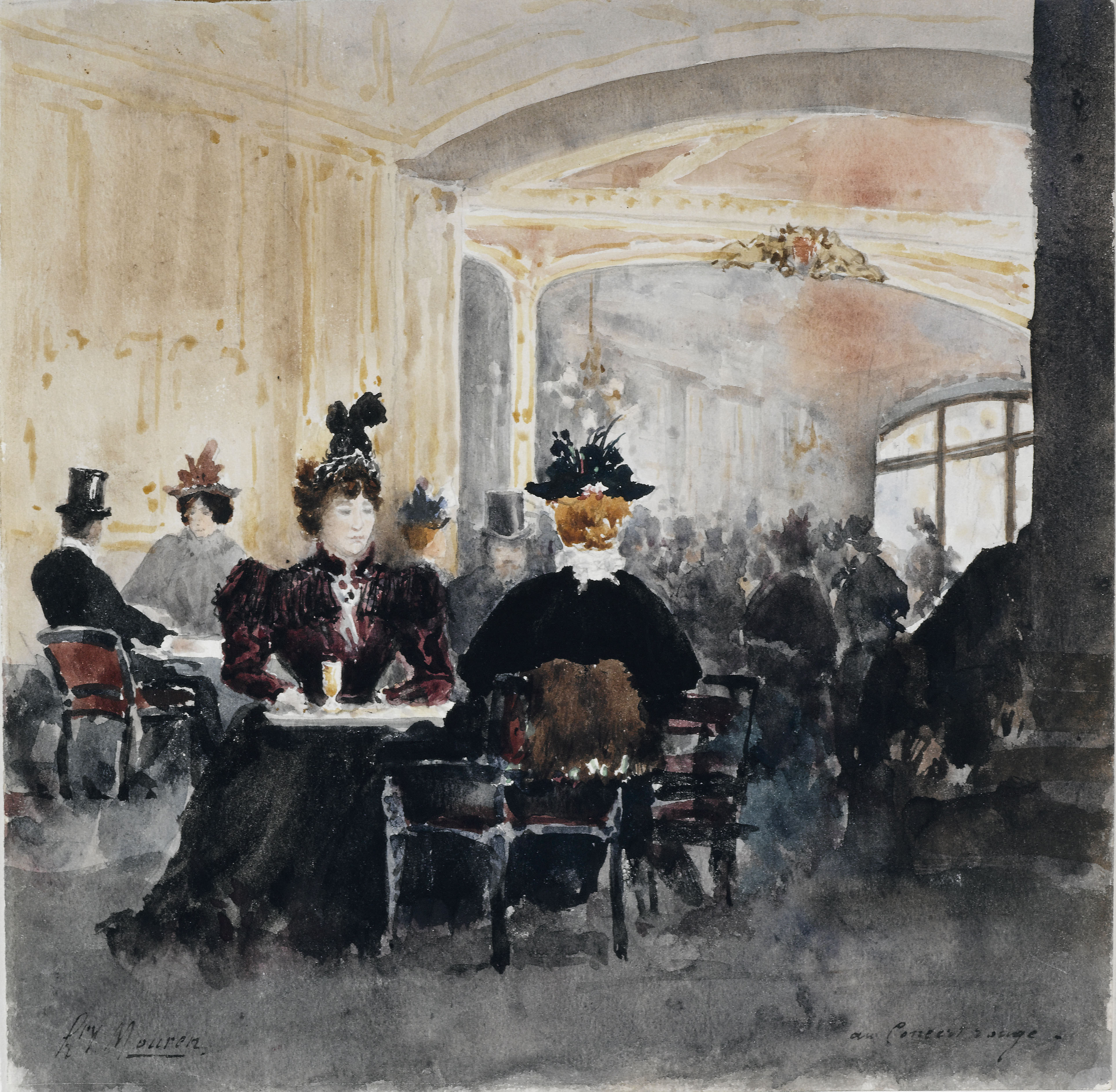 Photo d'un tableau de Henri Mouren, libre de droits , fournie par le musée Carnavalet, montrant l'intérieur de la salle des Concerts Rouge